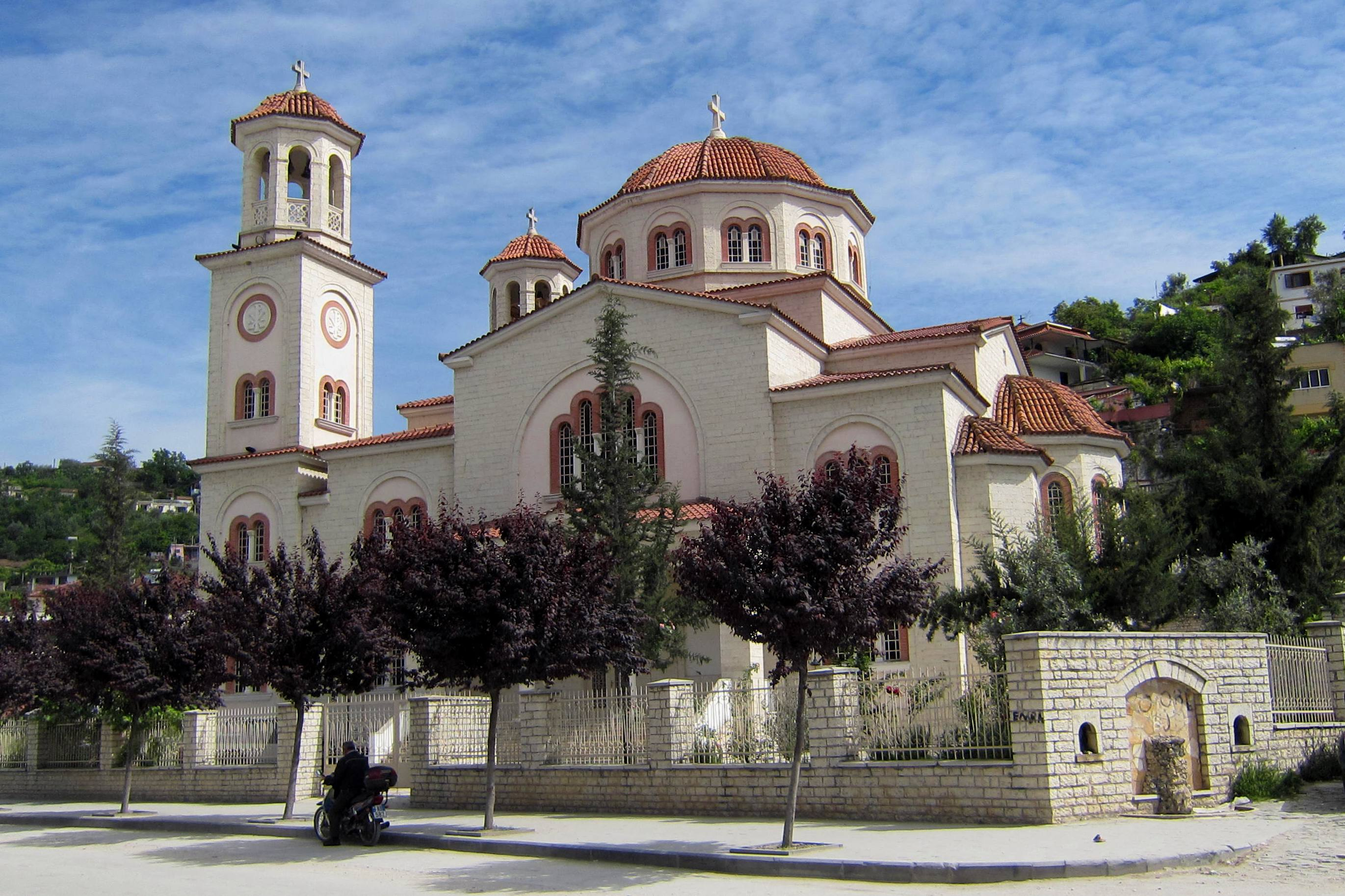 Die orthodoxe „Kathedrale des Heiligen Demetrius“ im Zentrum von Berati, Albanien